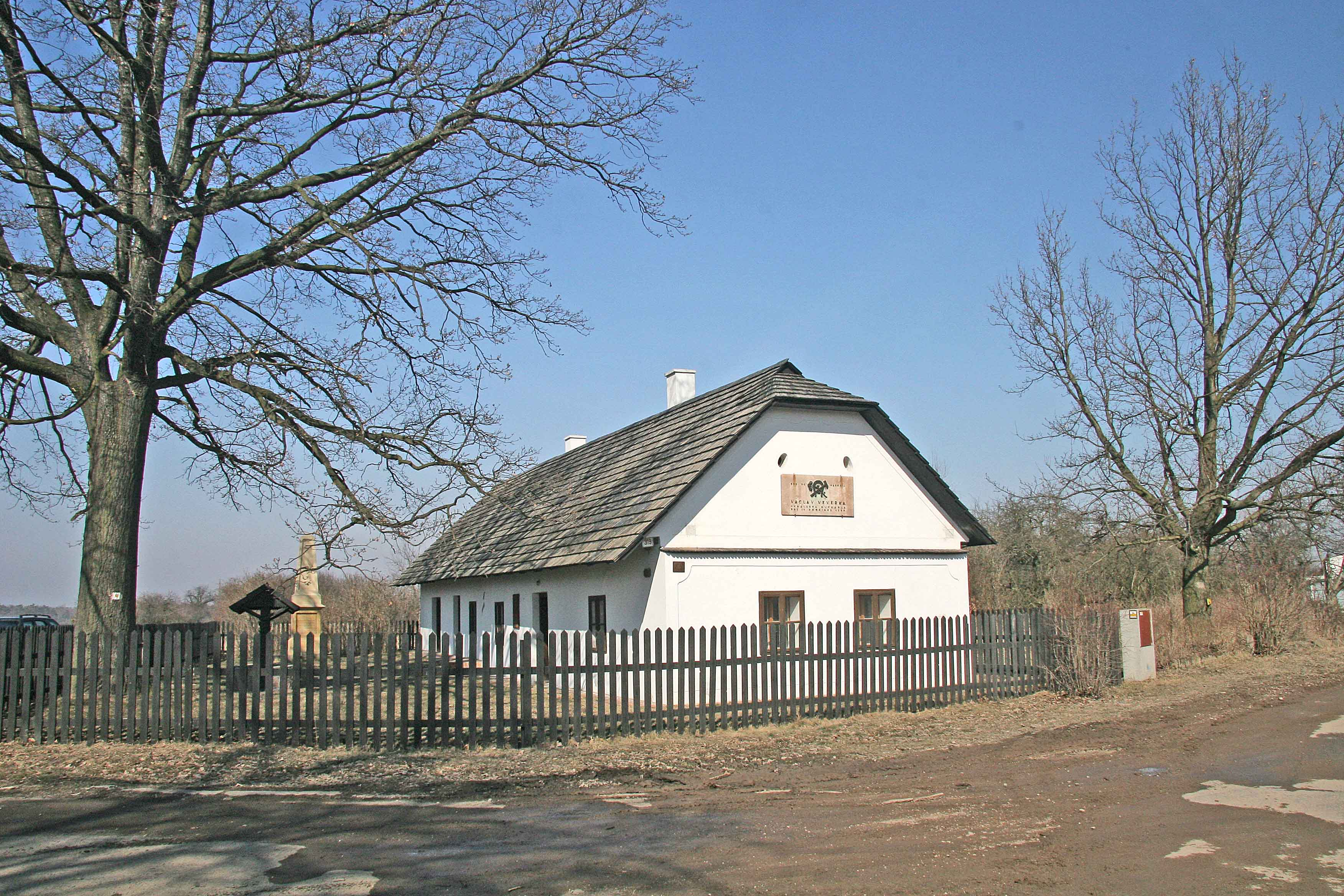 Rodný domek bratranců Veverkových v Rybitví autor:Zp